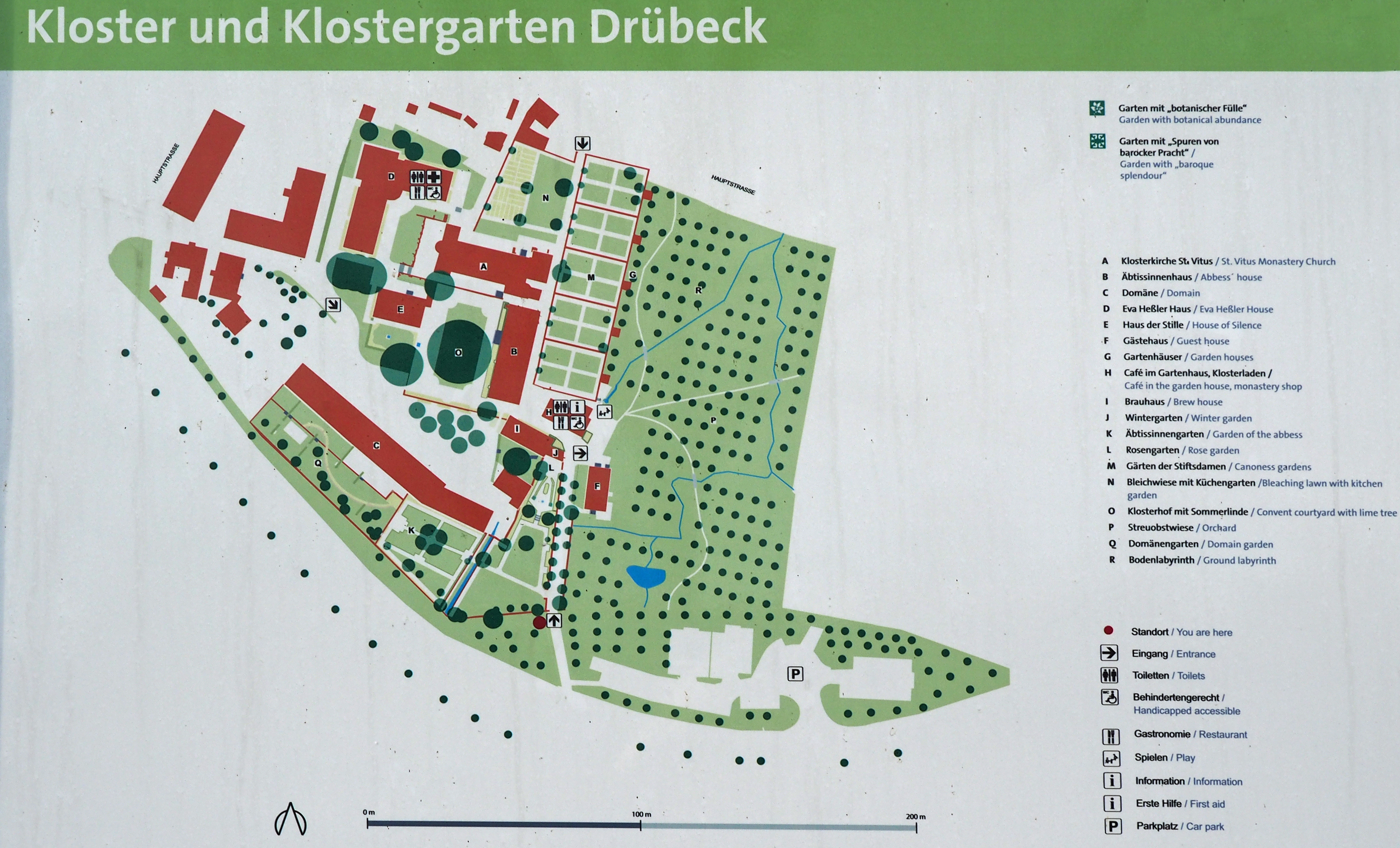 Übersichtsplan Kloster Drübeck, Ilsenburg (Harz)